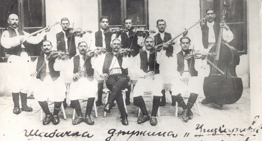 Muzička družina Cicvarići ispred kafane "Zlatno burence" I to: Alija Ibrić, Baka II Cicvarić, Amid Cicvarić, Omer Penco Cicvarić, Memiš Gardić, Mema i Musa Jovanović, Milarem Gardić, Ibro Milić, Nurija Garić, Osman Loso Cicvarić.